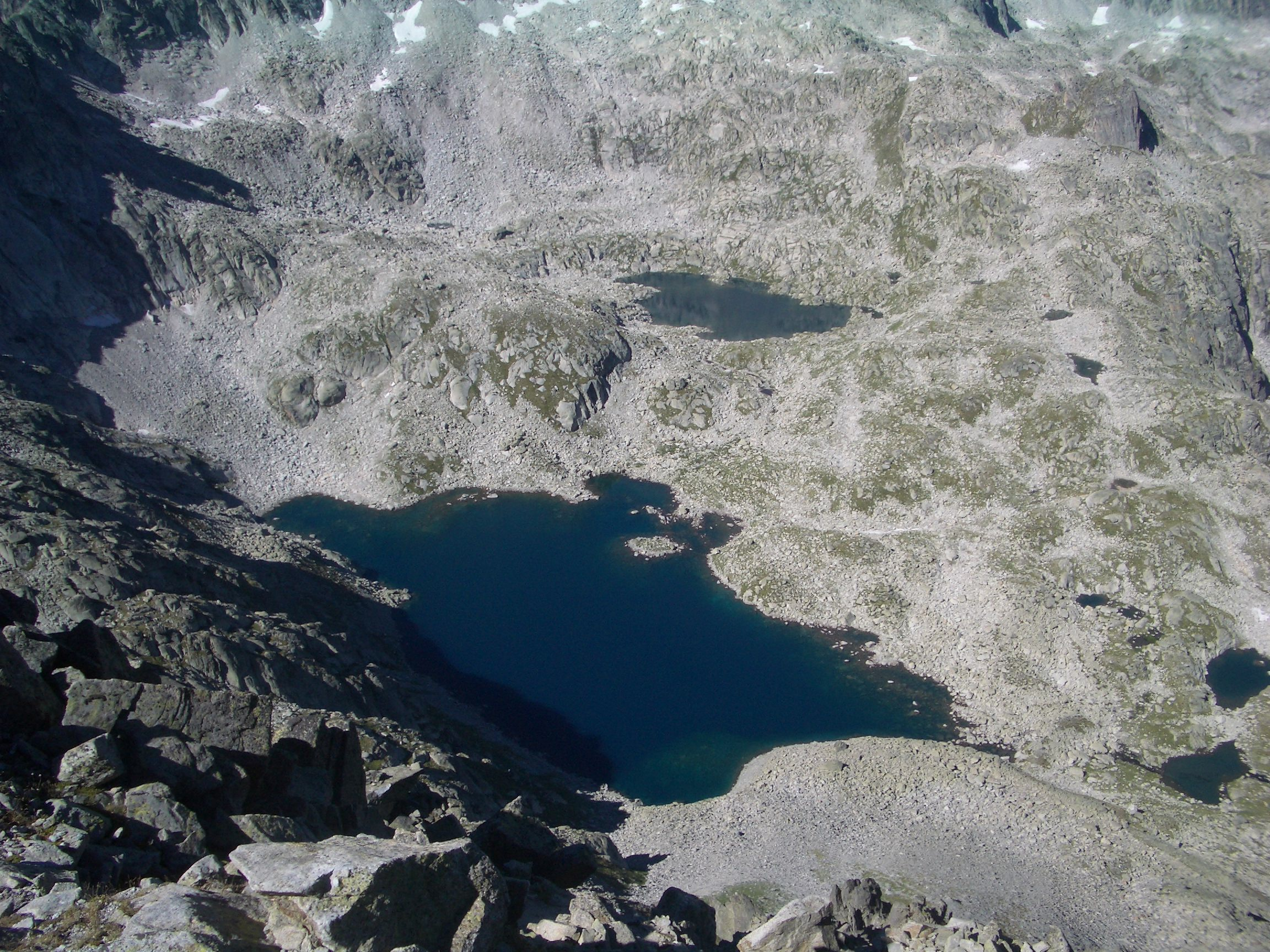 Estanh de Ratera de Colomèrs e Estanh deth Cap de Colomers